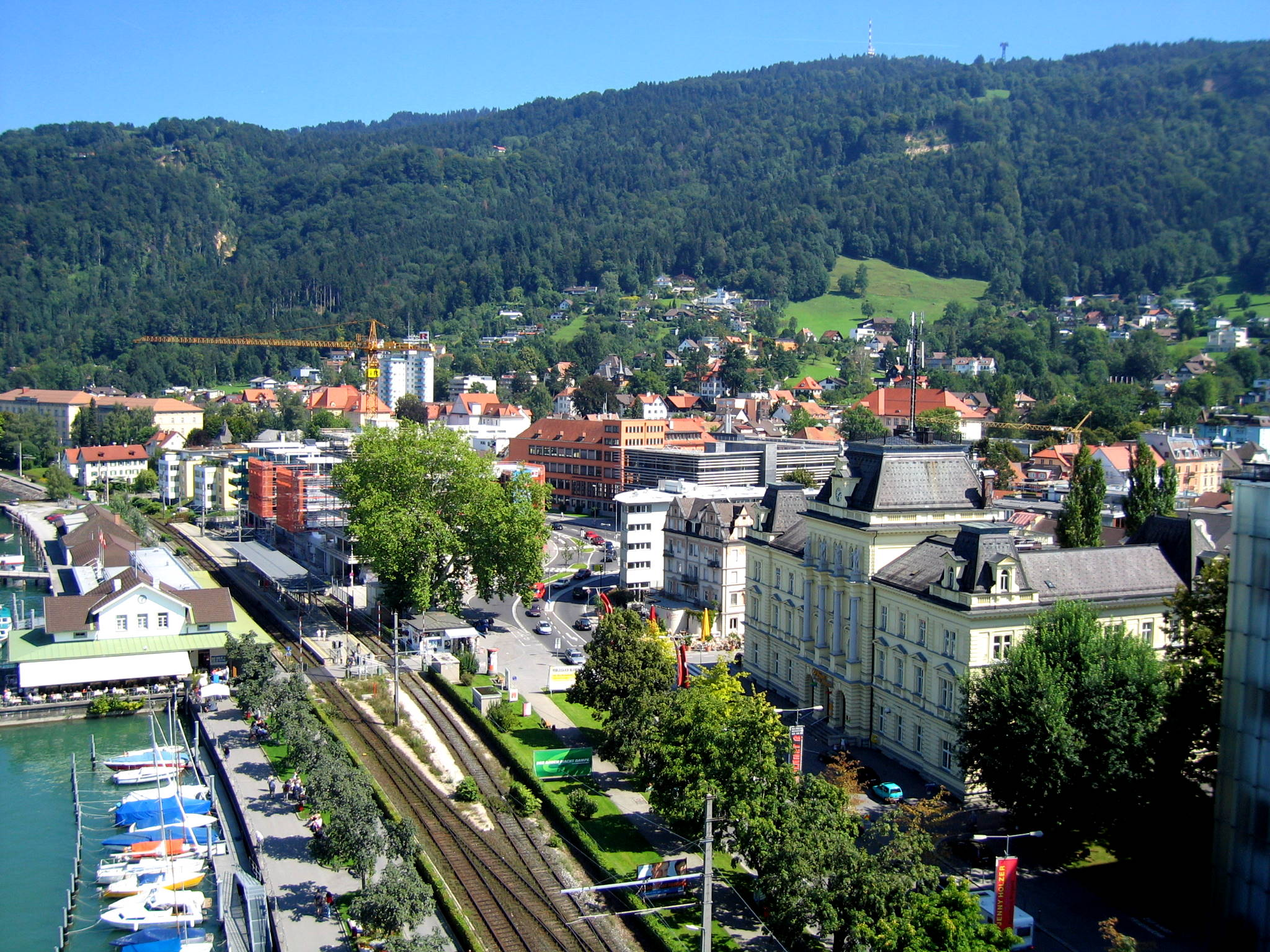 Bregenz mit Post rechts im Vordergrund und Pfänder im Hintergrund